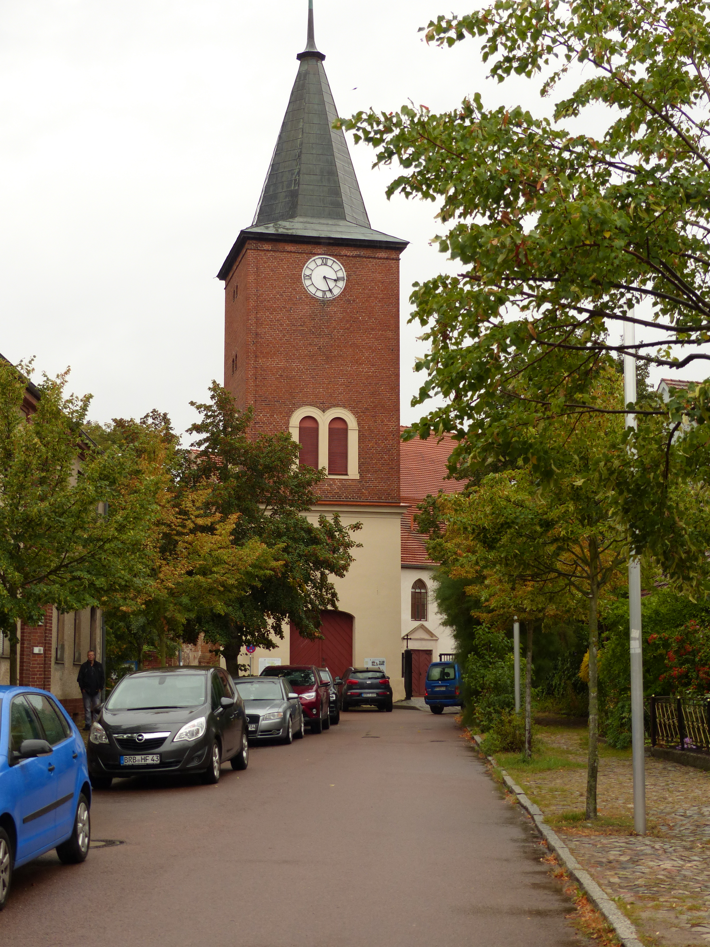 Turm der evangelischen Kirche in Brandenburg-Plaue